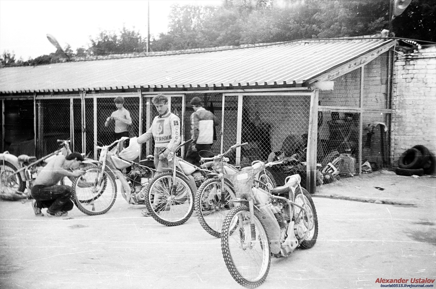 Подготовка мотоциклов между заездами. Тольятти, 1986 год. Гонщик команды "Нефтяник" из Октябрьска Вячеслав Кочергин.